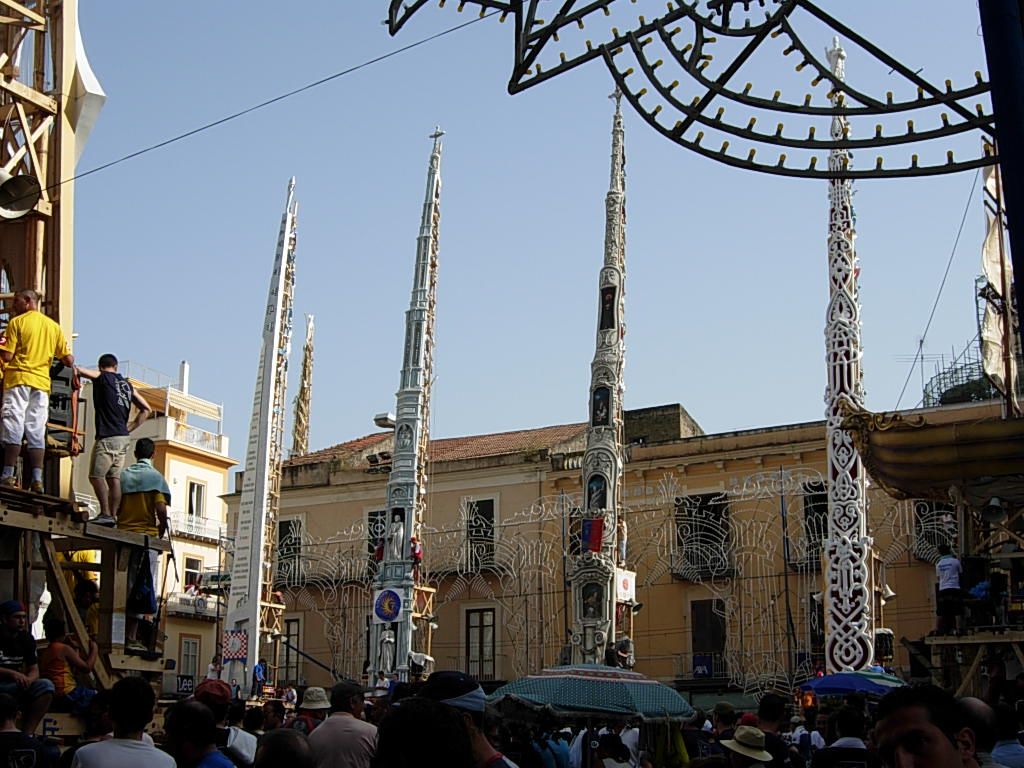 Festa dei Gigli di Nola 2007 Foto personale concessa in PD